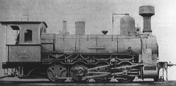 Lokomotive ATE IVa der Aussig-Teplitzer Eisenbahn